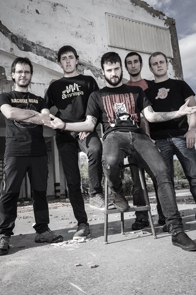 Somolsa